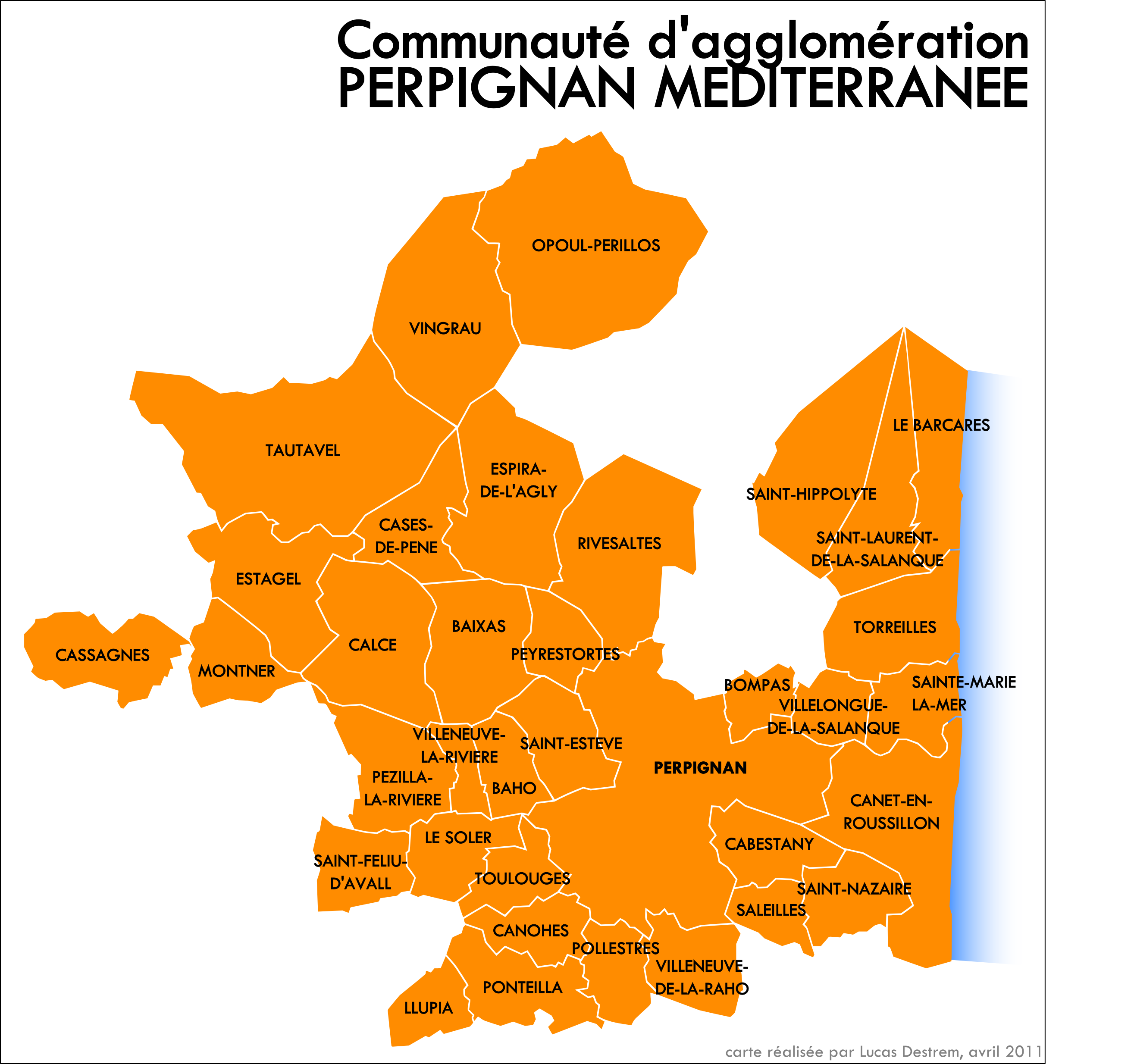 Carte des 36 communes de la communauté d'agglomération Perpignan-Méditerranée (Pyrénées-Orientales, France)